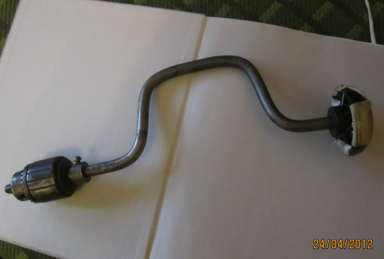 Фото самодельного коловорота с зубчатым патроном.